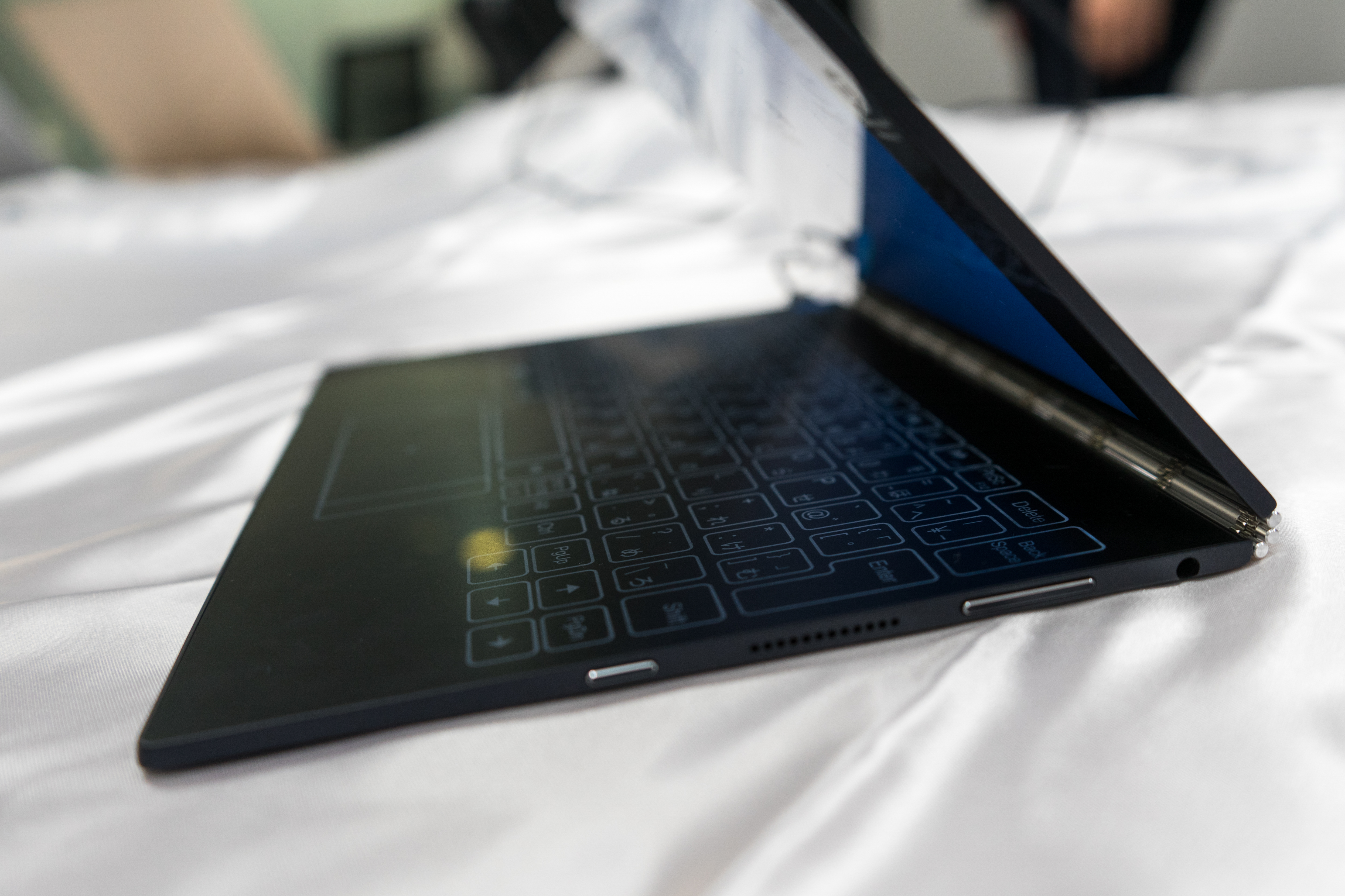 LenovoT&T201703-151.jpg